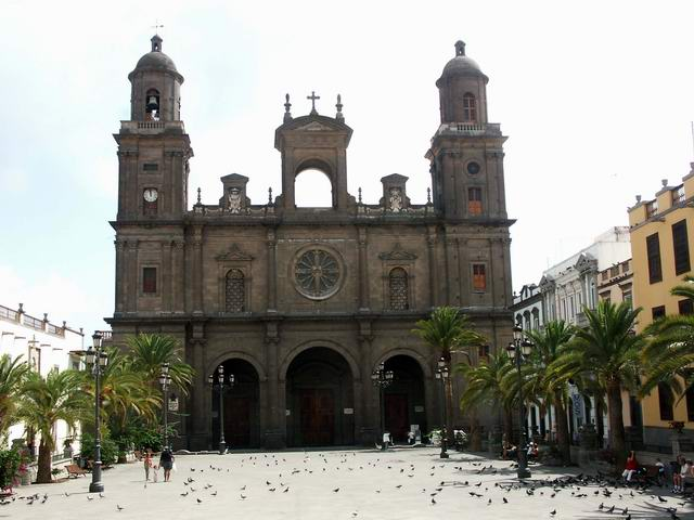 Kathedrale Santa Ana in Las Palmas, Gnu Fdl, Fotografiert Runghold am 9.9.2004 // Catedral de Canarias (bajo la advocación de Santa Ana) Las Palmas de Gran Canaria (Islas Canarias)